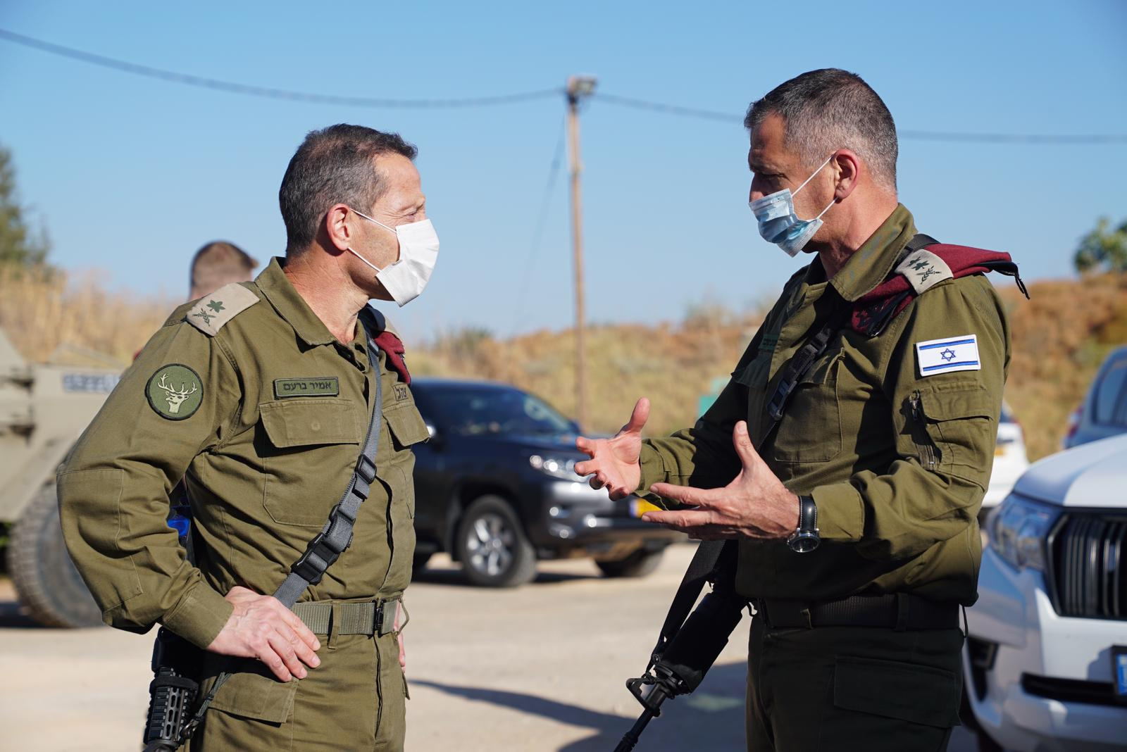 ביקור רב-אלוף אביב כוכבי בגבול לבנון.